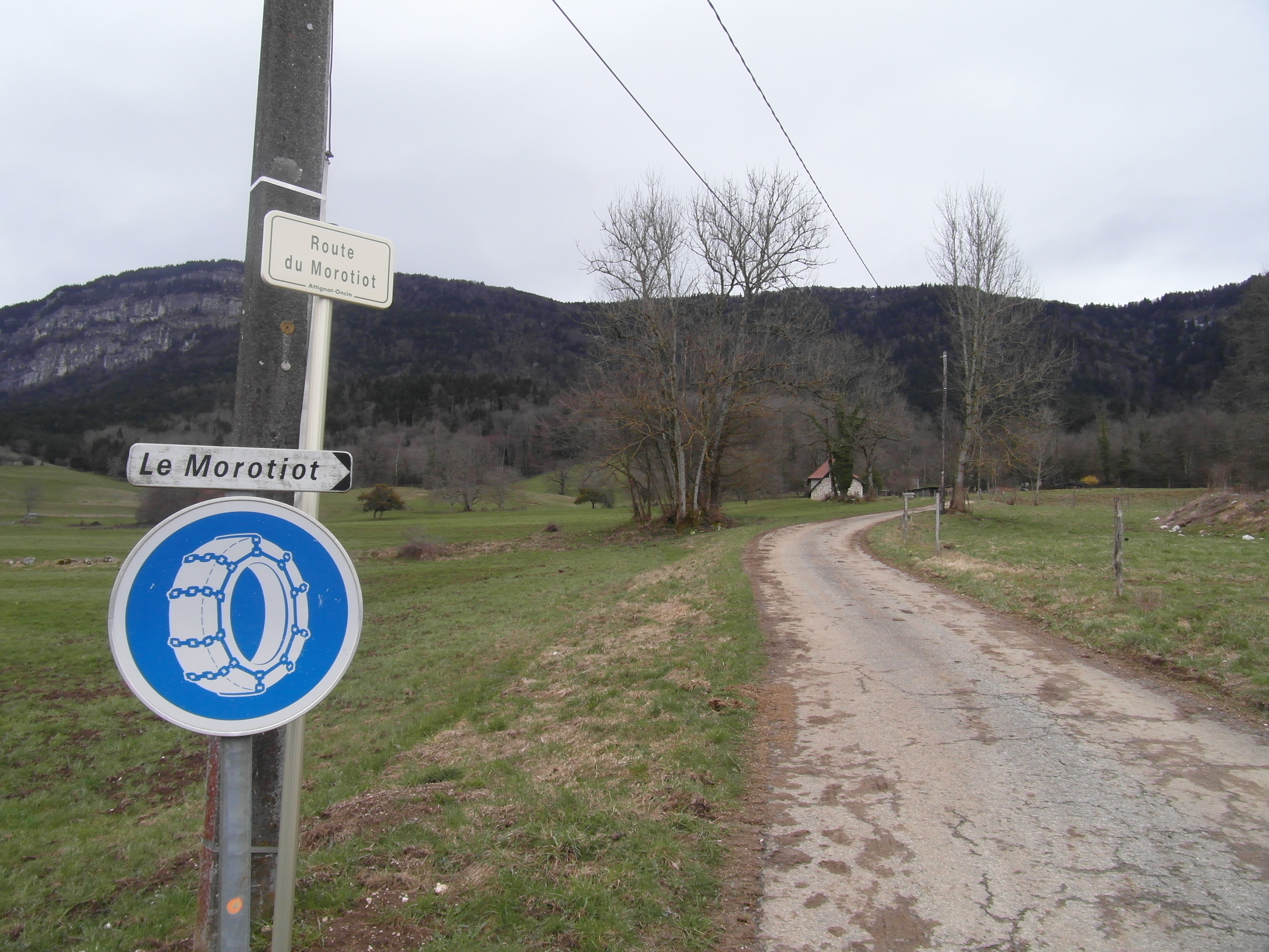 Route du Morotiot à Attignat-Oncin